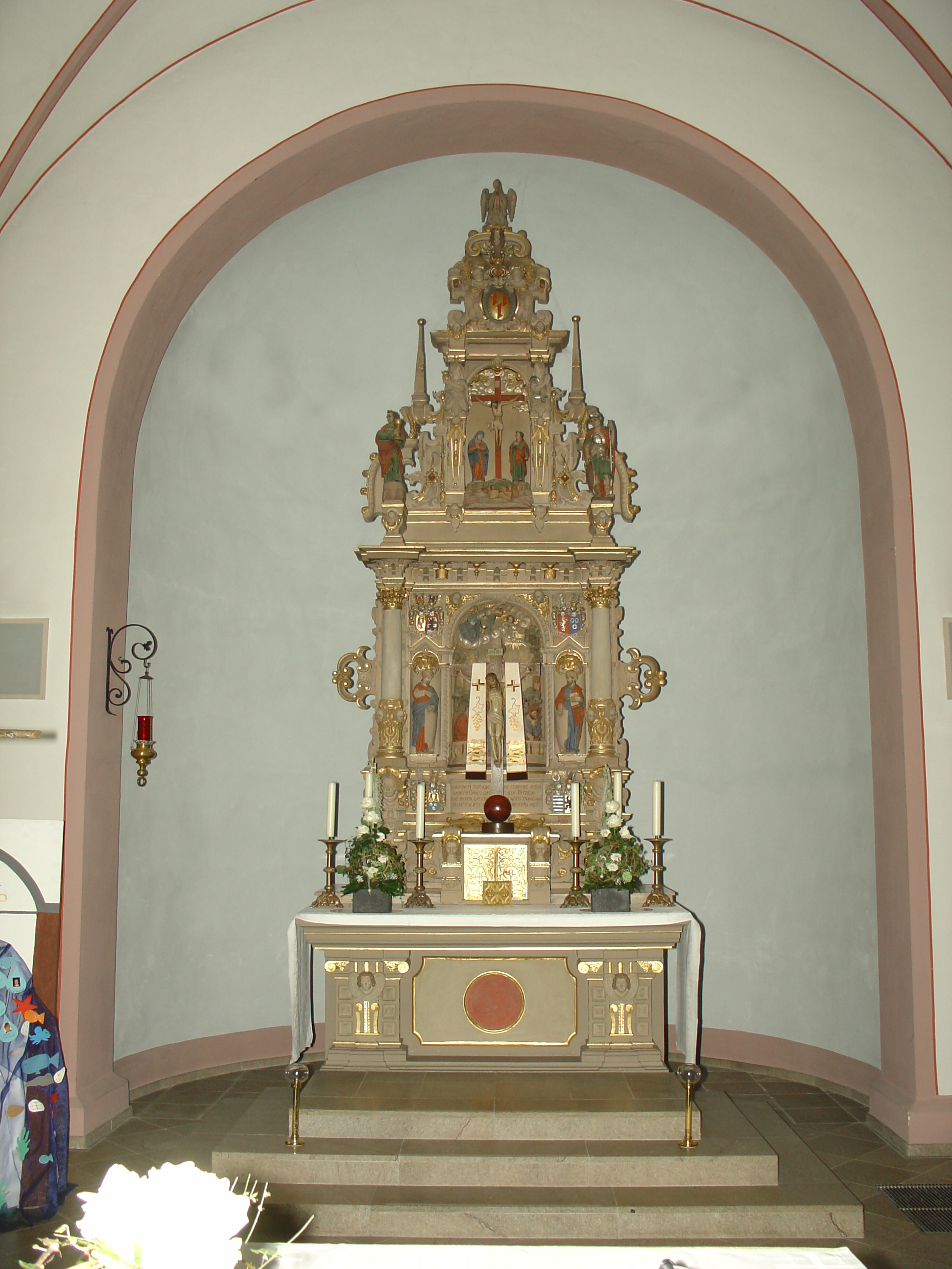 Hochaltar von St. Anna in Rietberg-Bokel, ursprünglich aus dem Dom zu Münster. "Eine Inschrift seitlich am Altar weist ihn als das Grabmal des 1622 verstorbenen Domherrn Heinrich von Galen aus." [1]